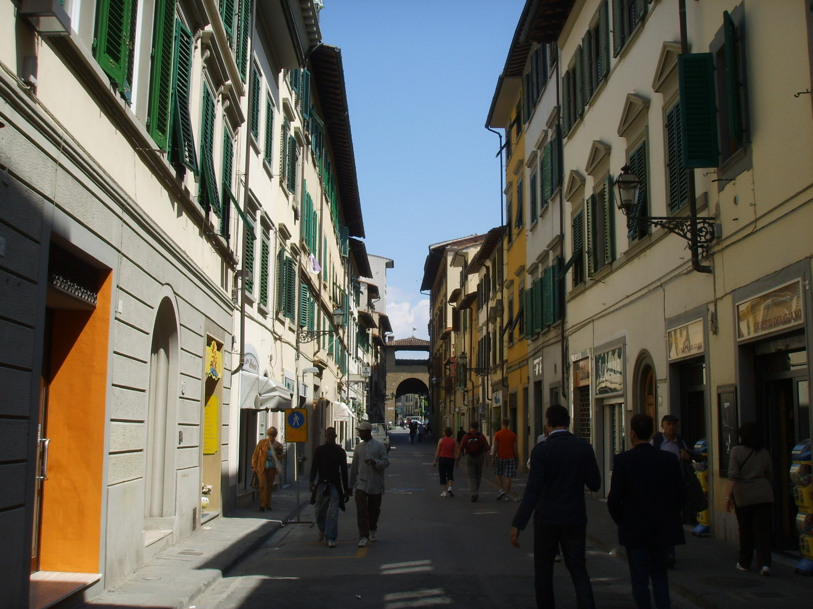 Borgo la croce